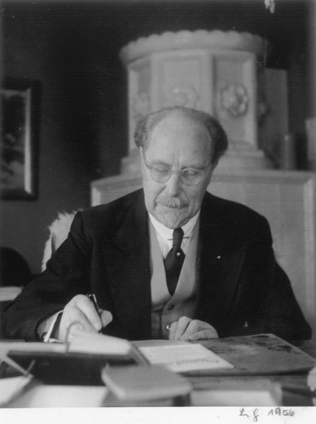 Karl Kurz, Pädagoge und Physiker, nach seiner Berentung, Aufgenommen 1956